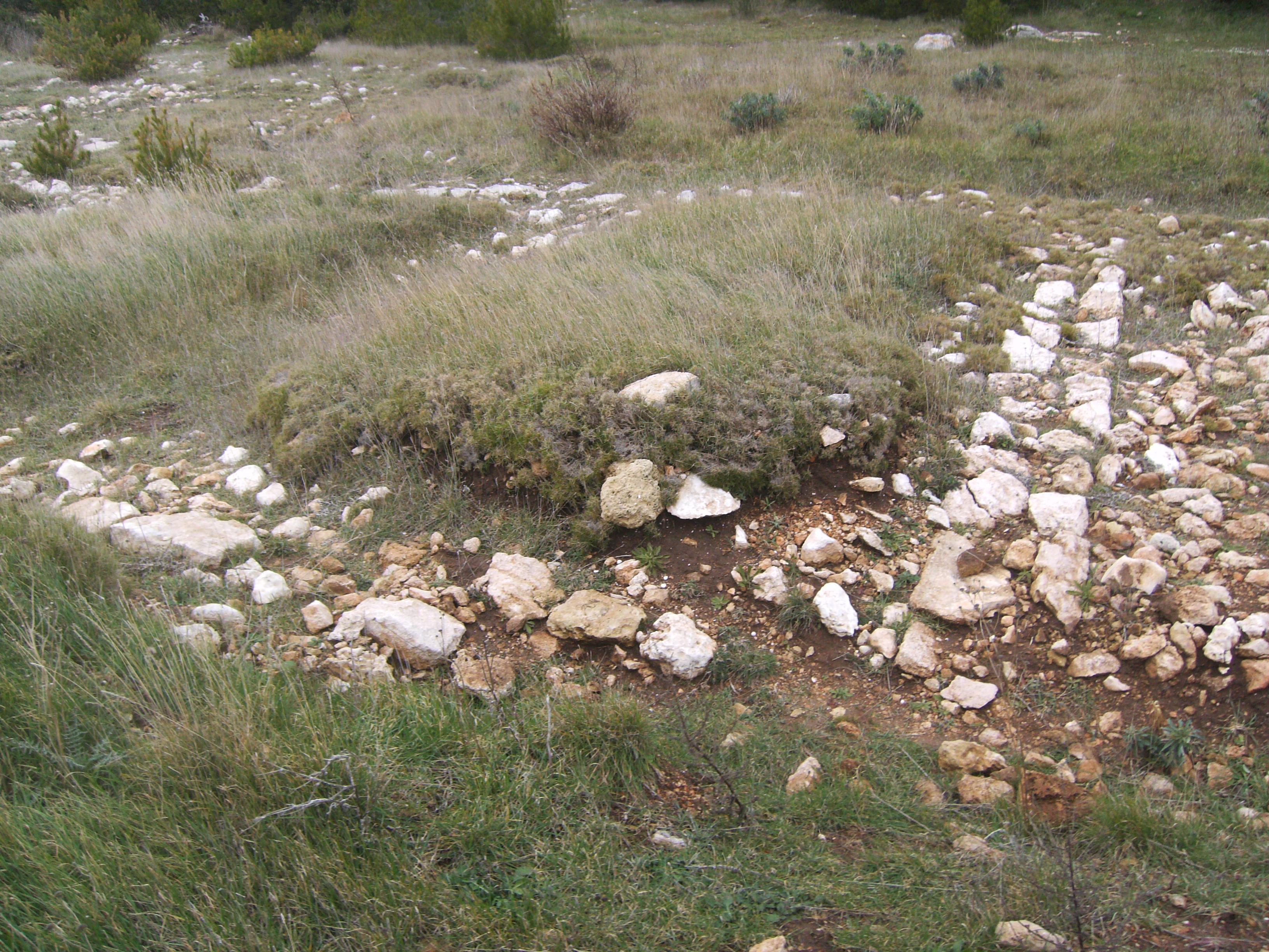 Vue des vestiges d'une habitation de la partie nord du village des Tamaris (Martigues, 13).